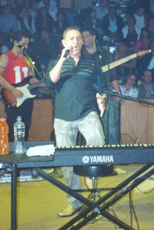 Franco de Vita at Puebla´s palenque 2006